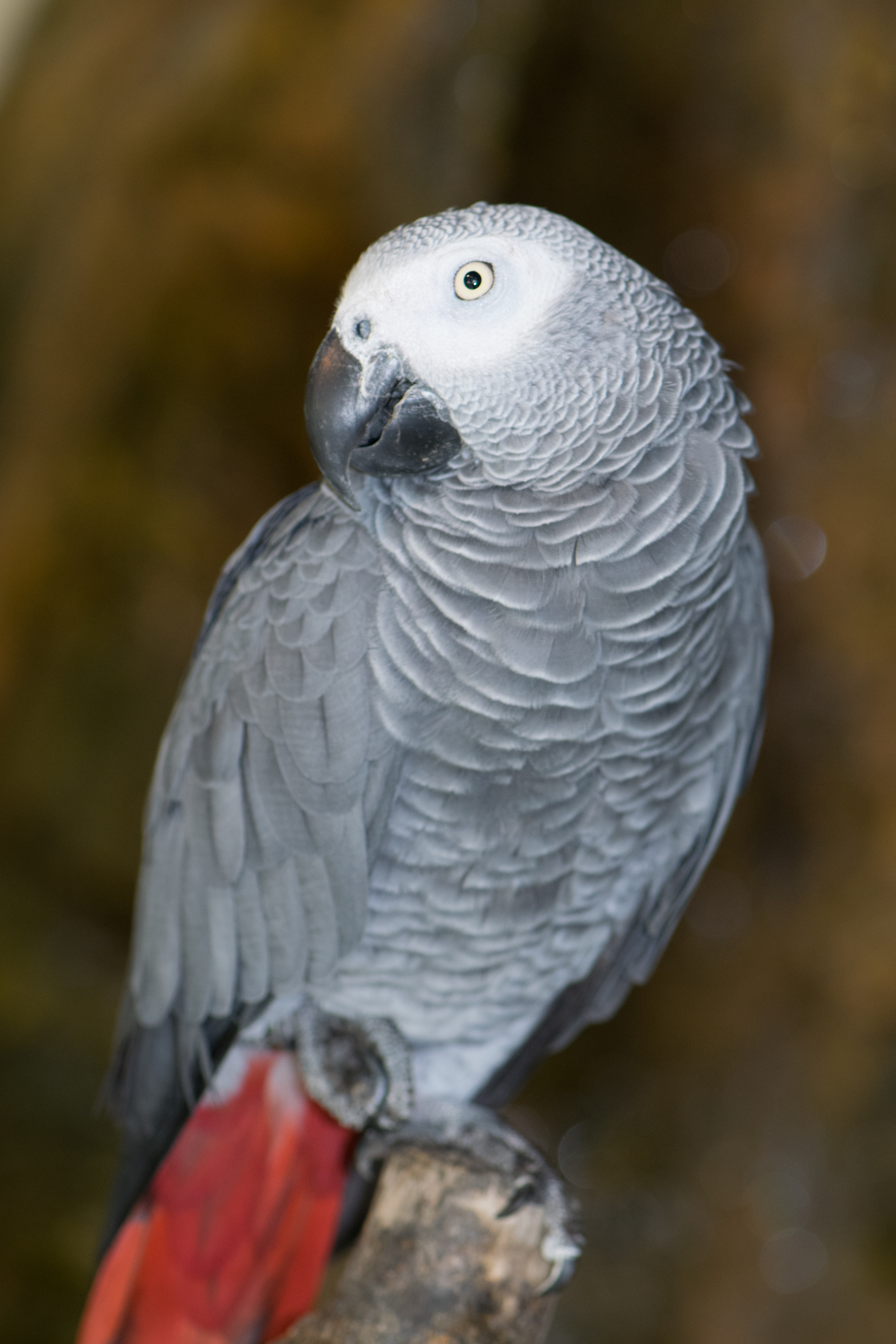 Kuala Lumpur 2015